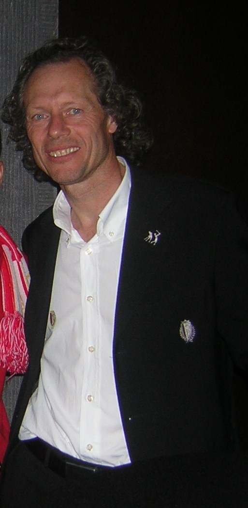 Photo de Michel Preud'homme lors de la parade du Standard De Liège le 6 mai 2008